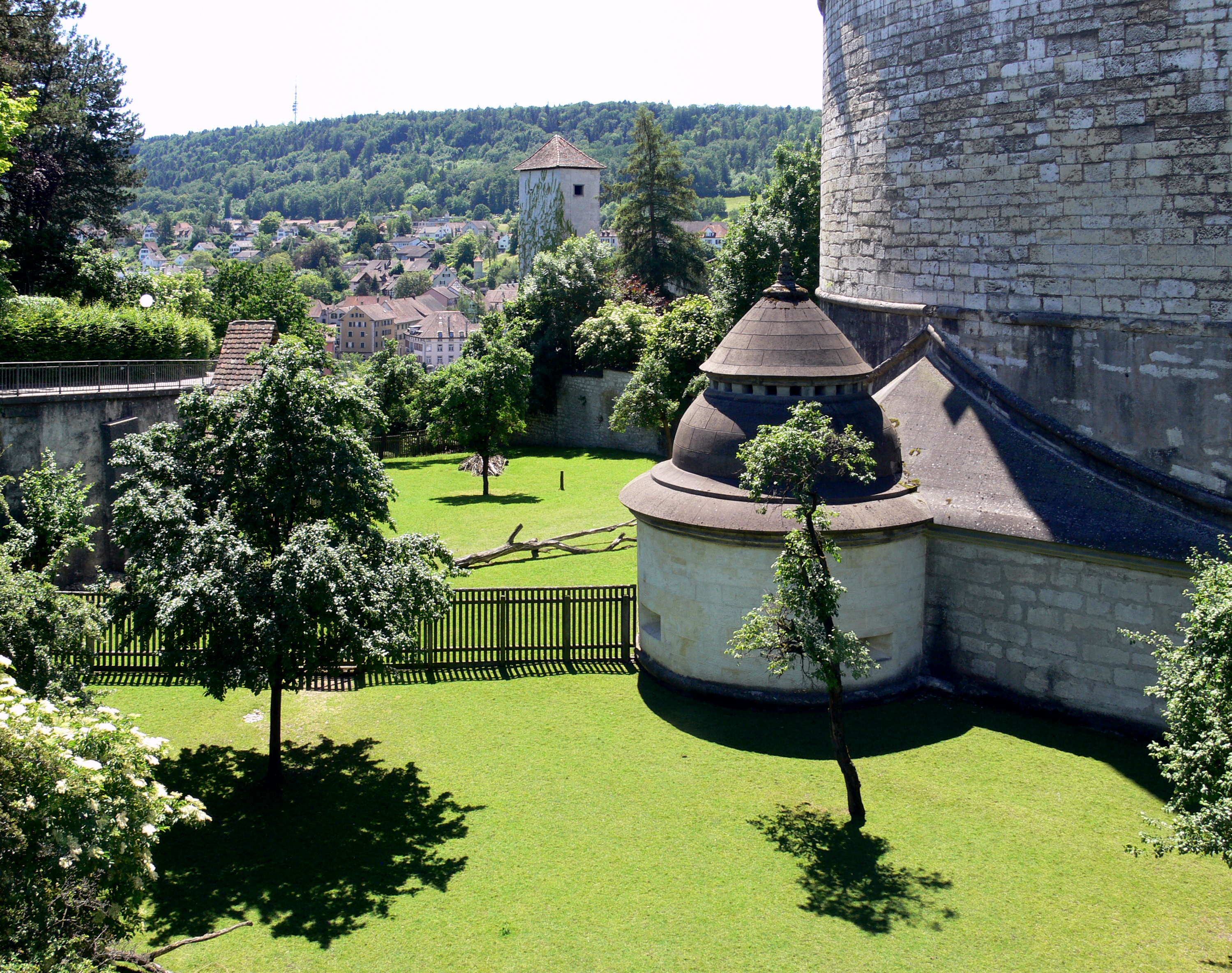 Schaffhausen, Munot , Munotgraben (heute Damhirschkolonie) mit Kaponniere